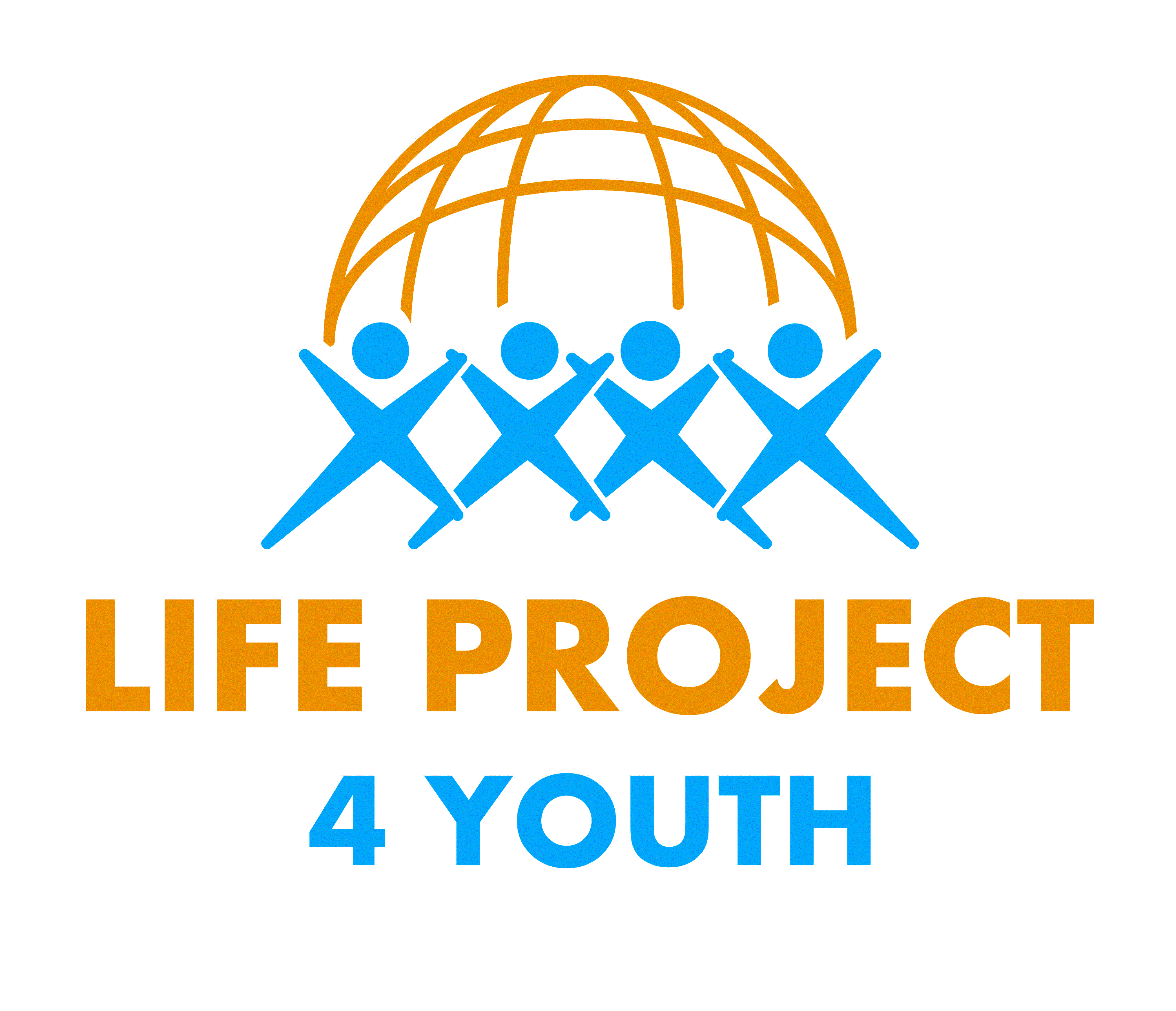 Logo LP4Y